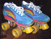 Blue disco quad roller skates